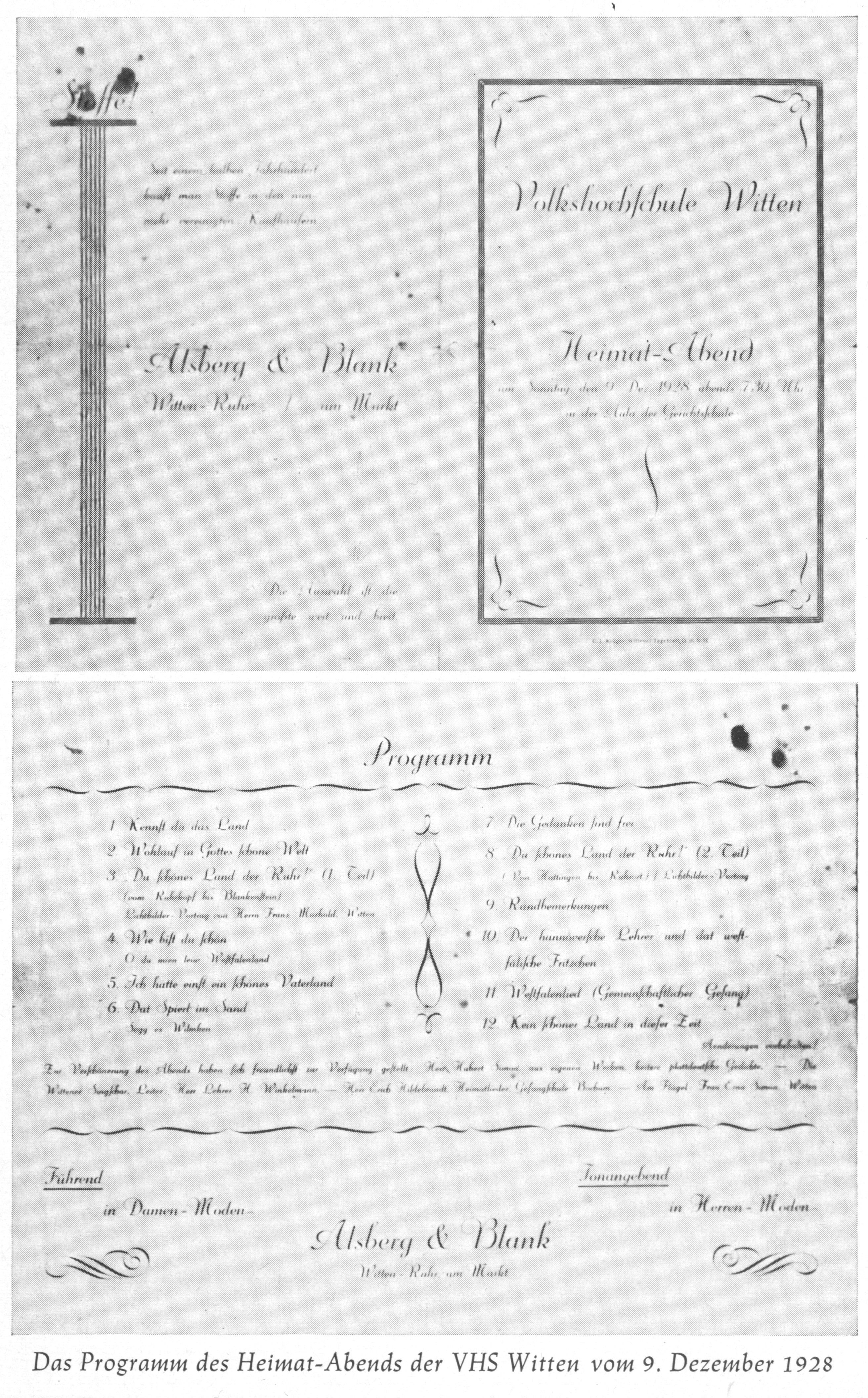 Programm des Heimatabends der VHS Witten vom 9. Dezember 1928